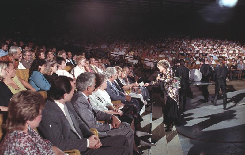 ADN-ZB /Franke/ 1.11.89: Berlin: 100. "Kessel Buntes" am 23.9.1989 im Palast der Republik Helga Hanemann - vielseitige Unterhaltungskünstlerin - stellte am Anfang der Sendung den unmittelbaren Kontakt zum Publikaum her.